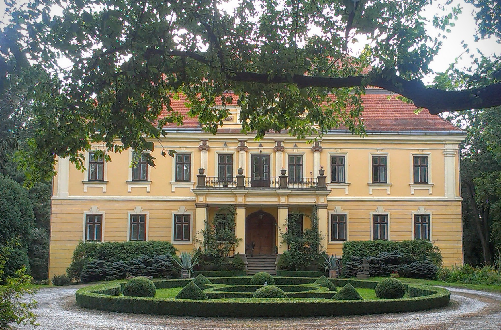 Zámek Hoštice, Hoštice 52, Hoštice (okres Kroměříž).